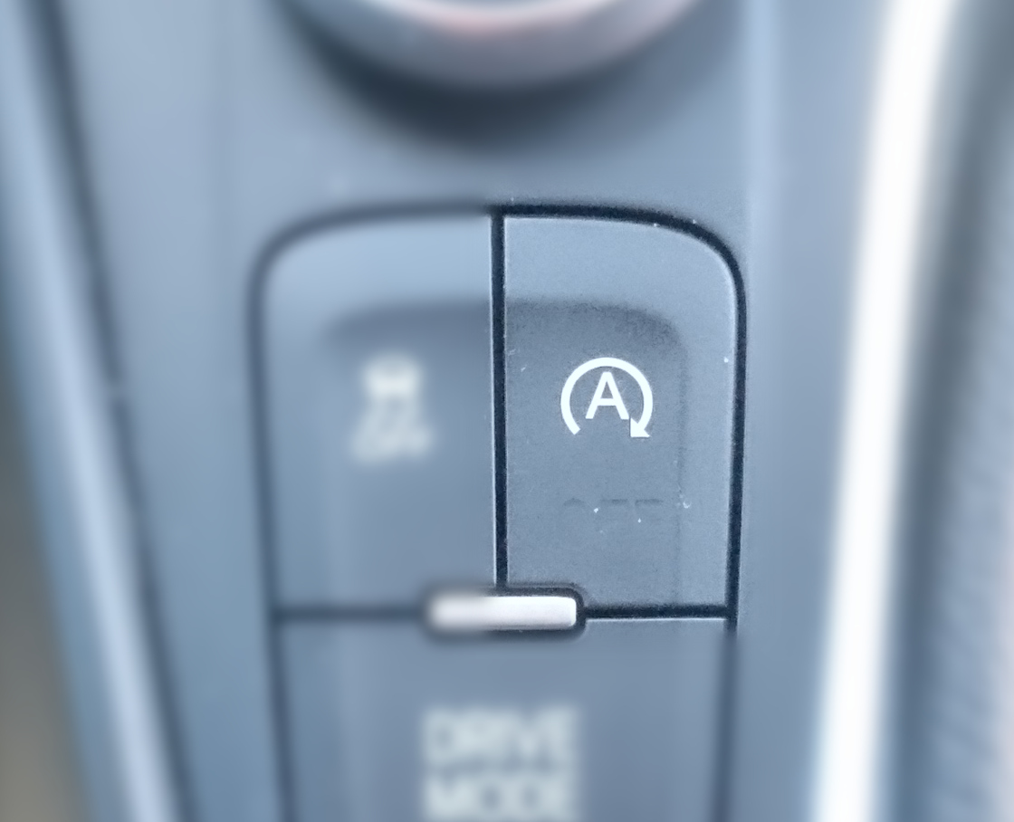 Bouton Stop & Start sur une Ford Focus RS 2018 (3ème génération)